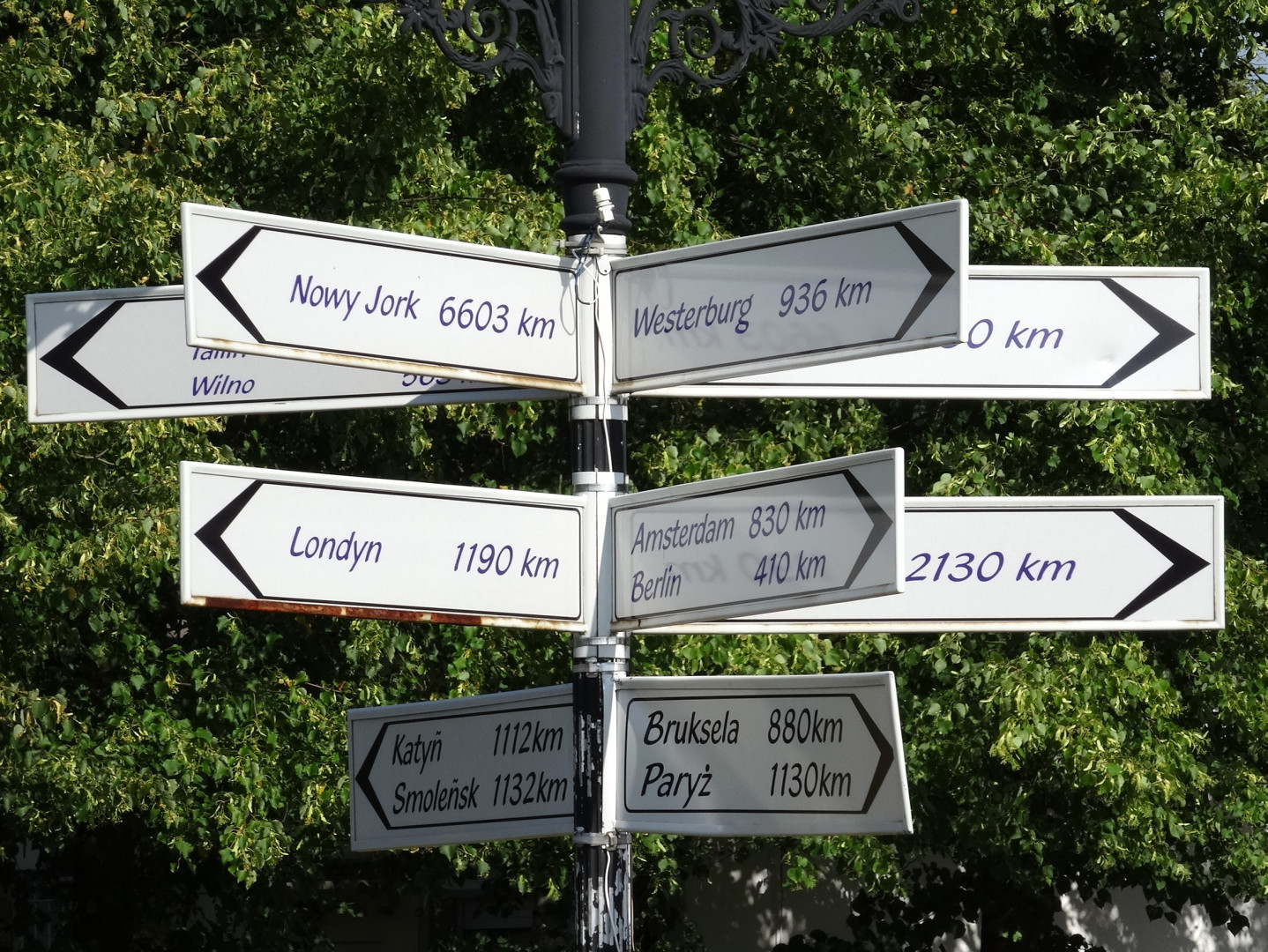 Róża odległości na skwerze w Nowej Wsi Wielkiej